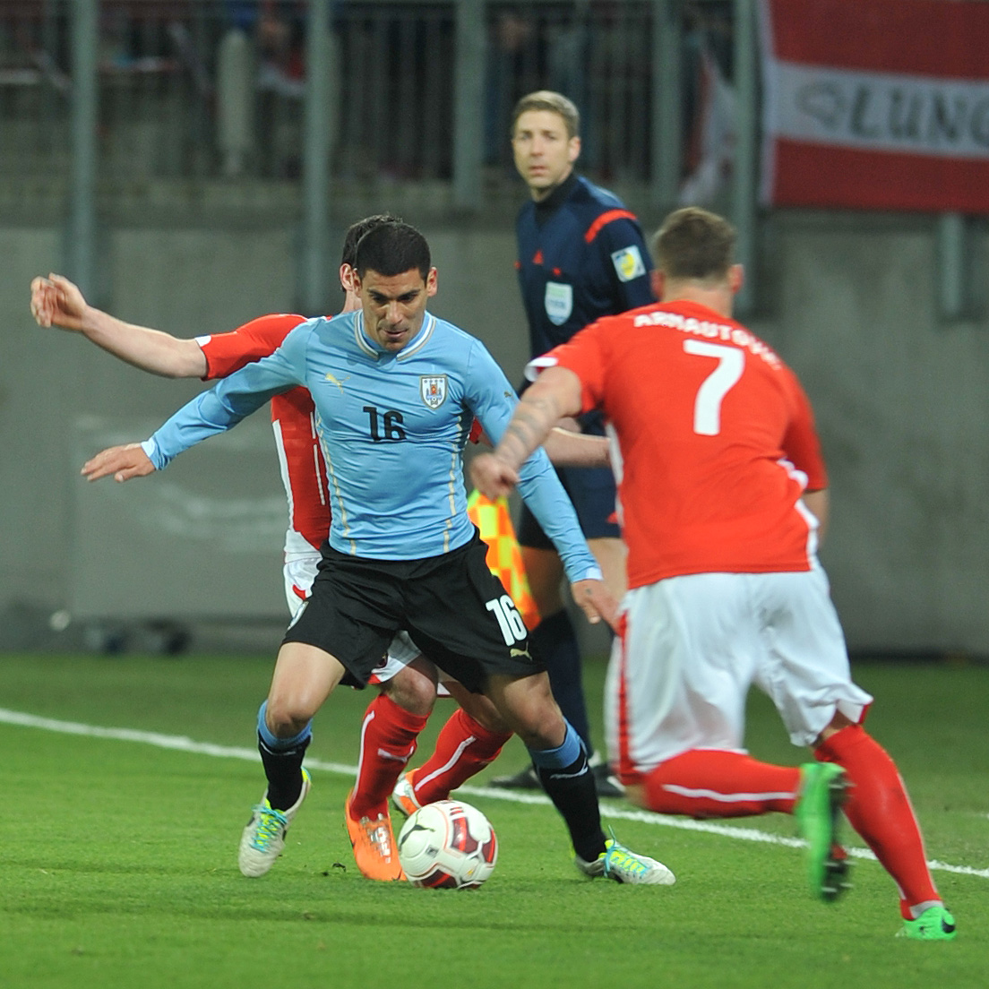 Freundschaftliches Länderspiel Österreich - Uruguay am 5. März 2014 in Klagenfurt: Maximiliano Pereira